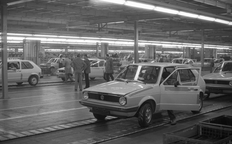 Staatsbesuch König Hussein II. und König Nur Al-Hussein in der Bundesrepublik Deutschland. Volkswagen Wolfsburg